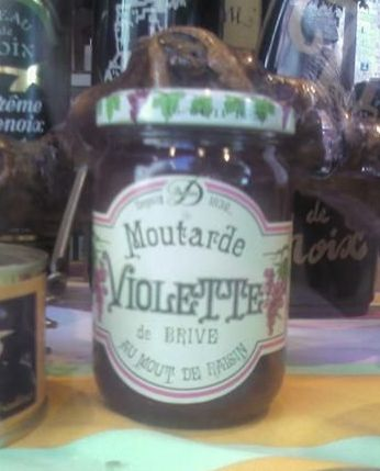 Un pot de mostassa violeta de Brive (Occitània)